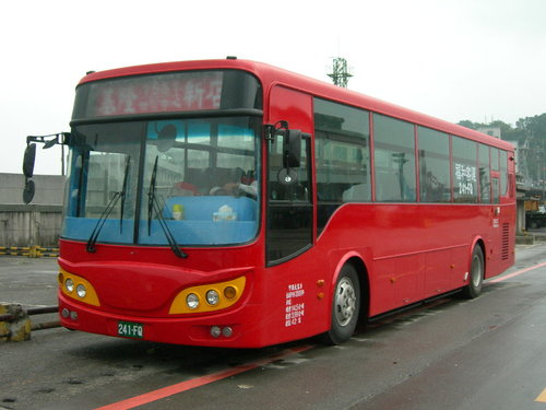 福和客運日野RK8JRSA大客車241-FQ左前方外觀